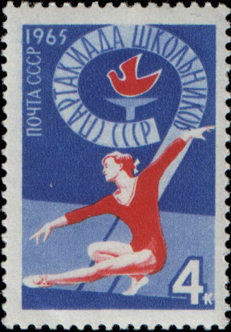 Почтовая марка СССР, посвящённая IX Всесоюзной Спартакиаде школьников в Минске. На ней изображена Полина Астахова в упражнениях на бревне по фотографии Л. Бородулина, опубликованной в журнале «Огонёк», 1962 год, №46, страница 29 (источник — книга Николая Кочеткова «О чём умолчали каталоги», Москва, «Марка», 2007 год). Художник — И. Мартынов. Номер — 3249 (ЦФА). Тираж — 4 млн экз.